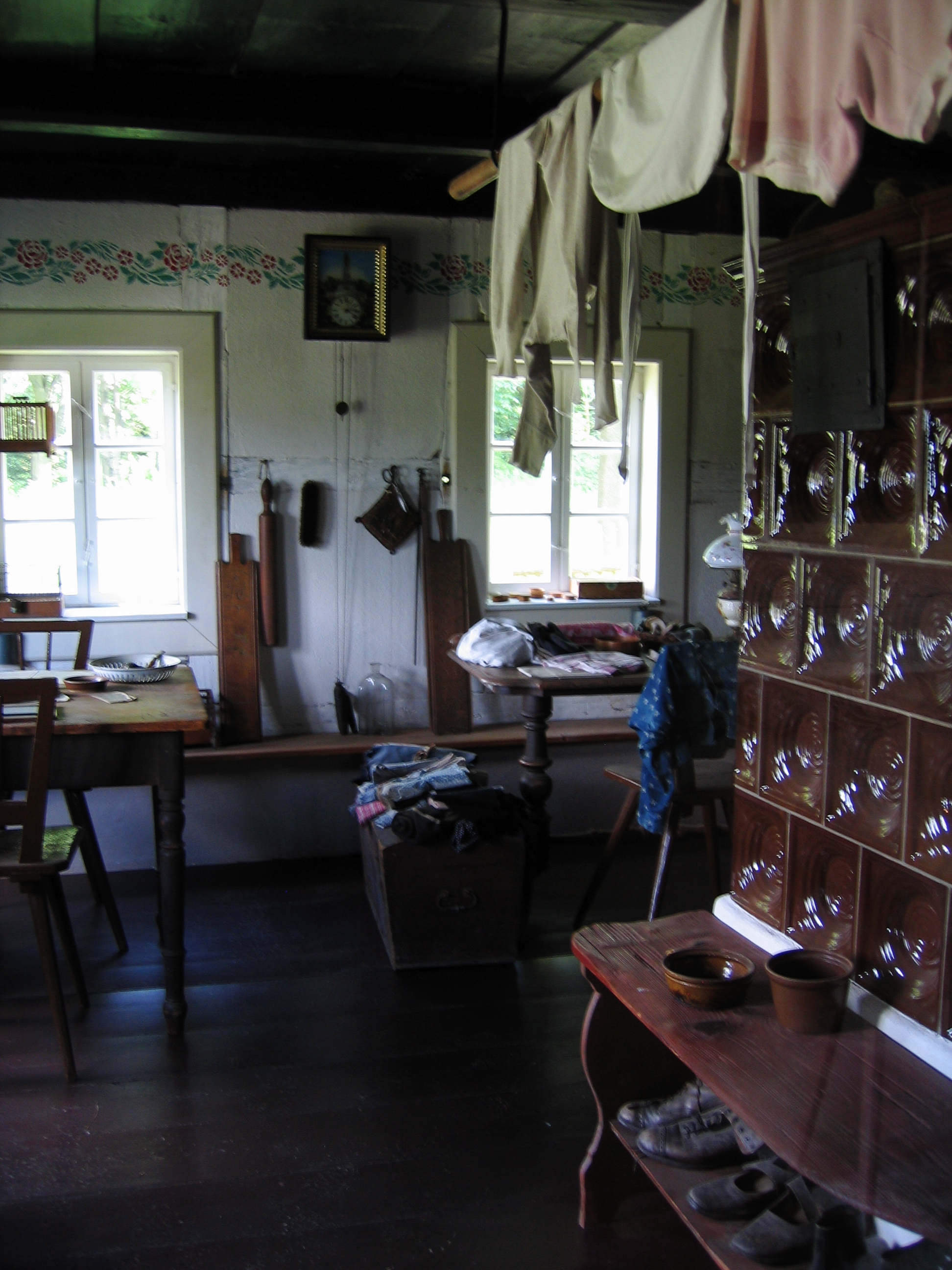 Erzgebirgisches Freilichtmuseum Seiffen, Juli 2009